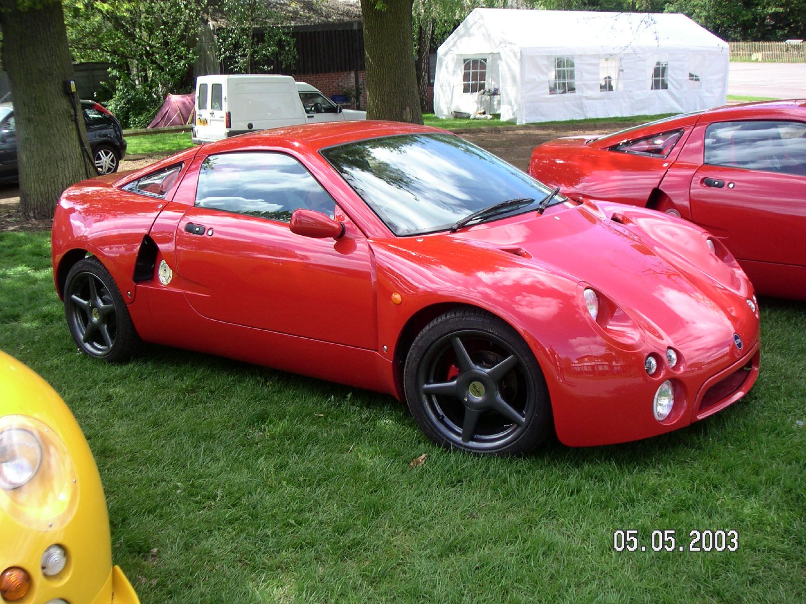 GTM Libra Kit car